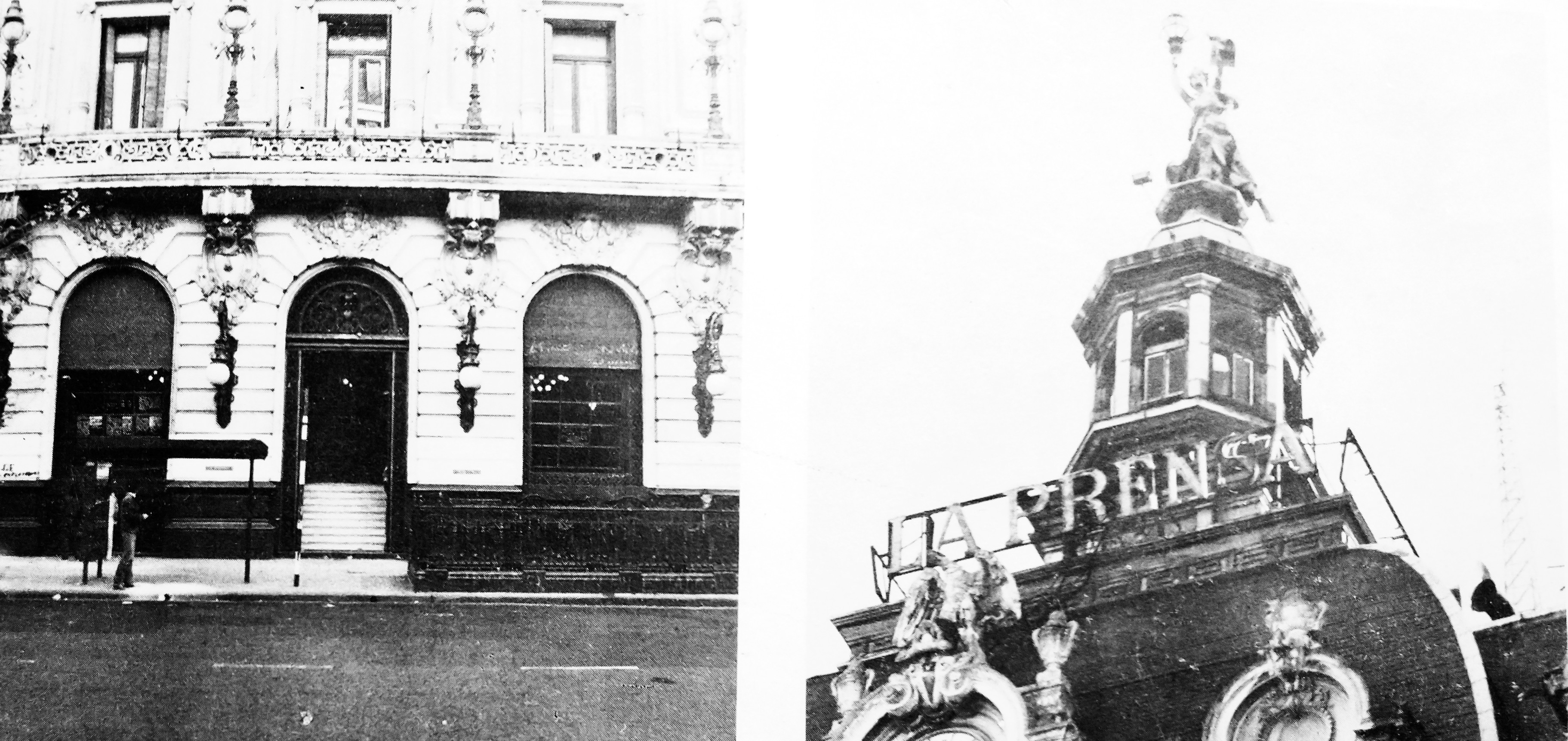 Ingreso desde Avenida de Mayo, detalles de ornamentación de estilo francés en farola y planta baja